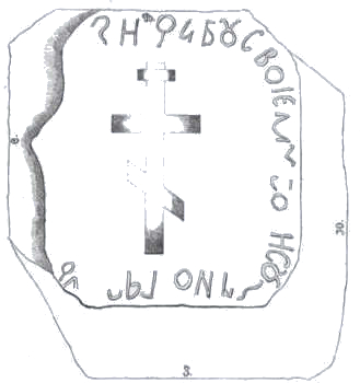 Изображение Борисова камня в селе Высокий Городец.